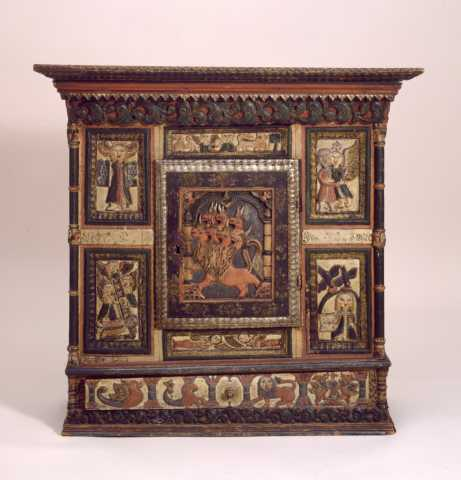 Hengeskap skåret av Iver Gundersen Øvstrud. Norsk Folkemuseum, NF.1931-0350.